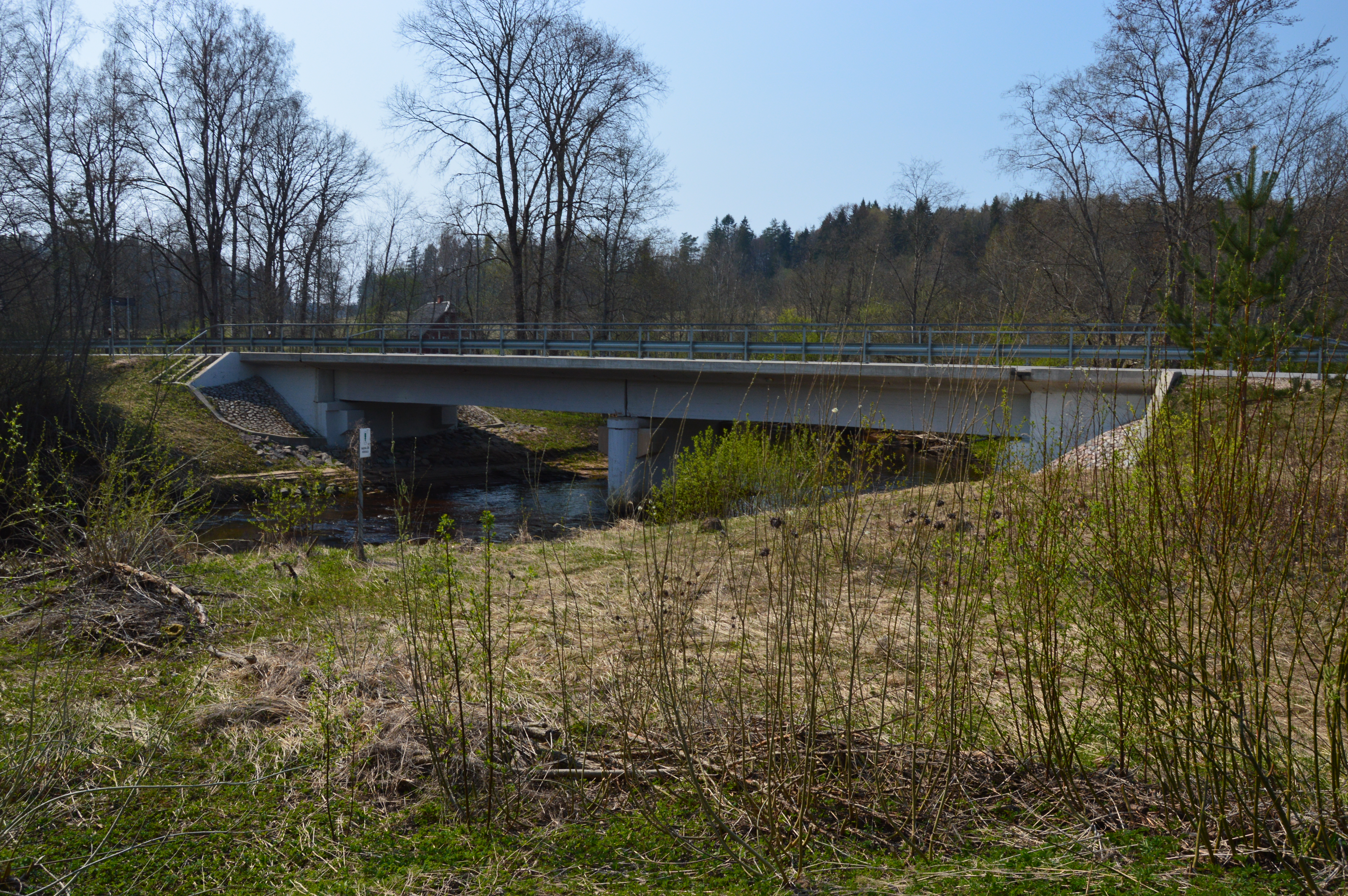 Vastse-Roosa sild üle Vaidva jõe.